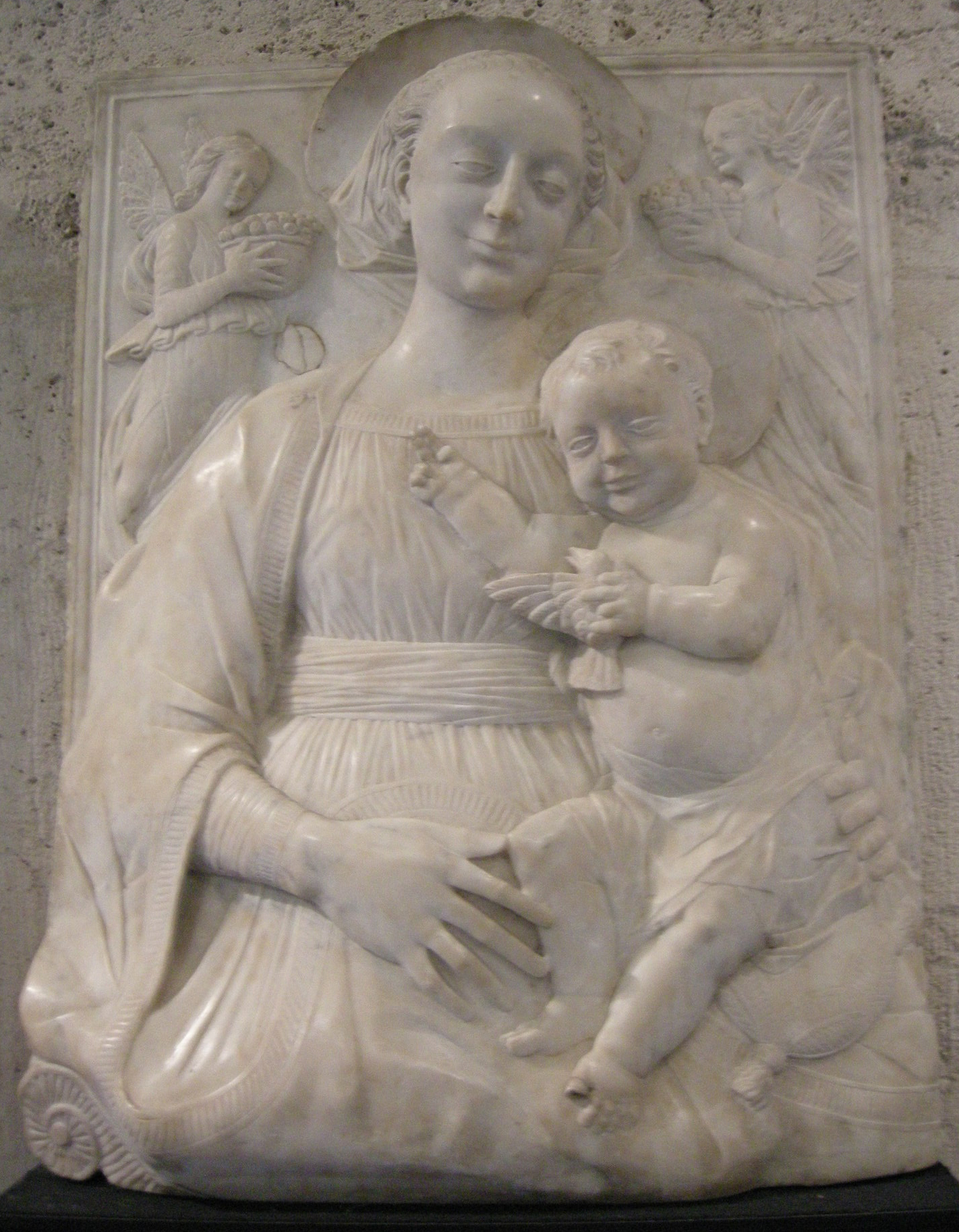 Maestro delle madonne di marmo, madonna col bambino.JPG